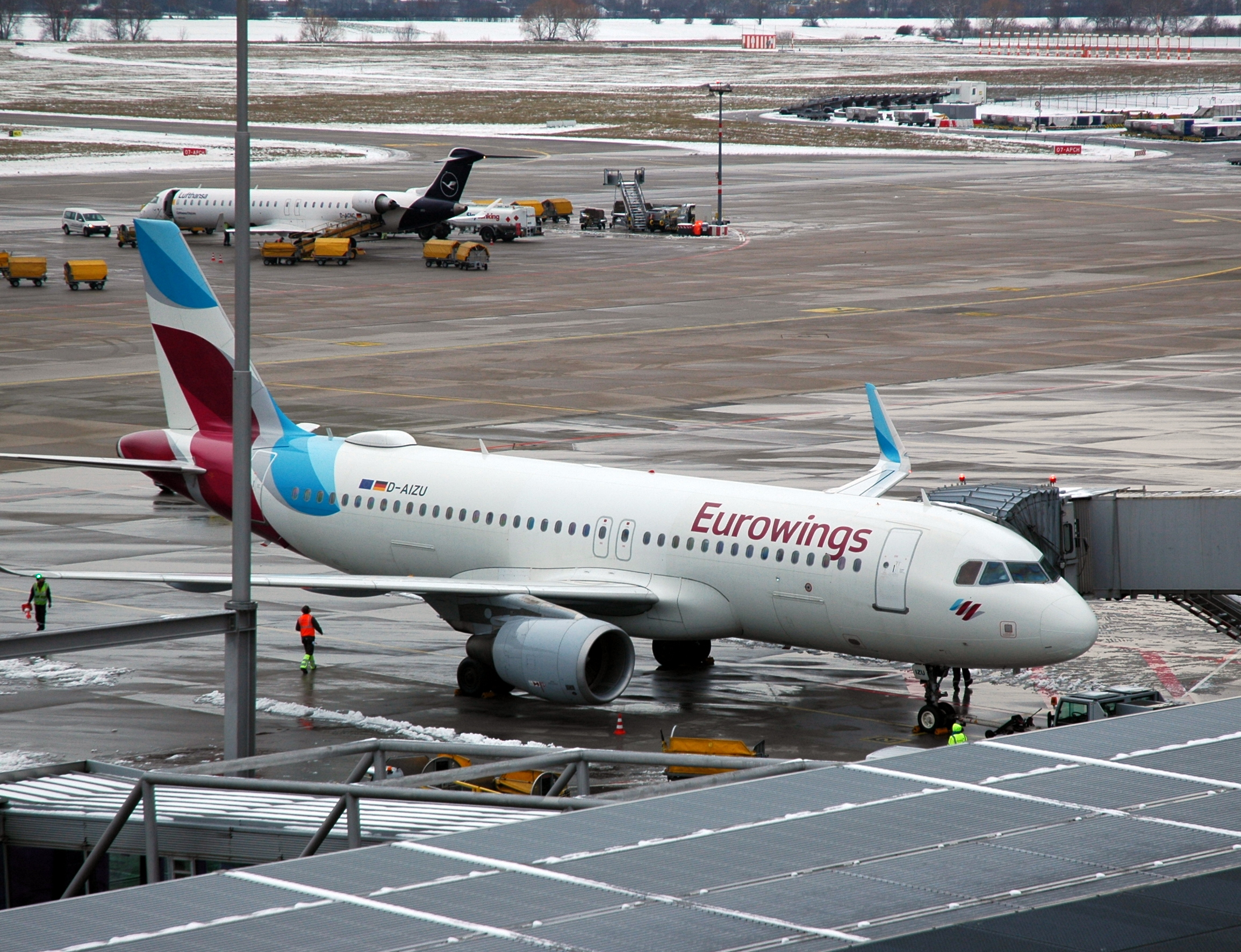 Flughafen Stuttgart - Eurowings - Airbus A320-214 - D-AIZU